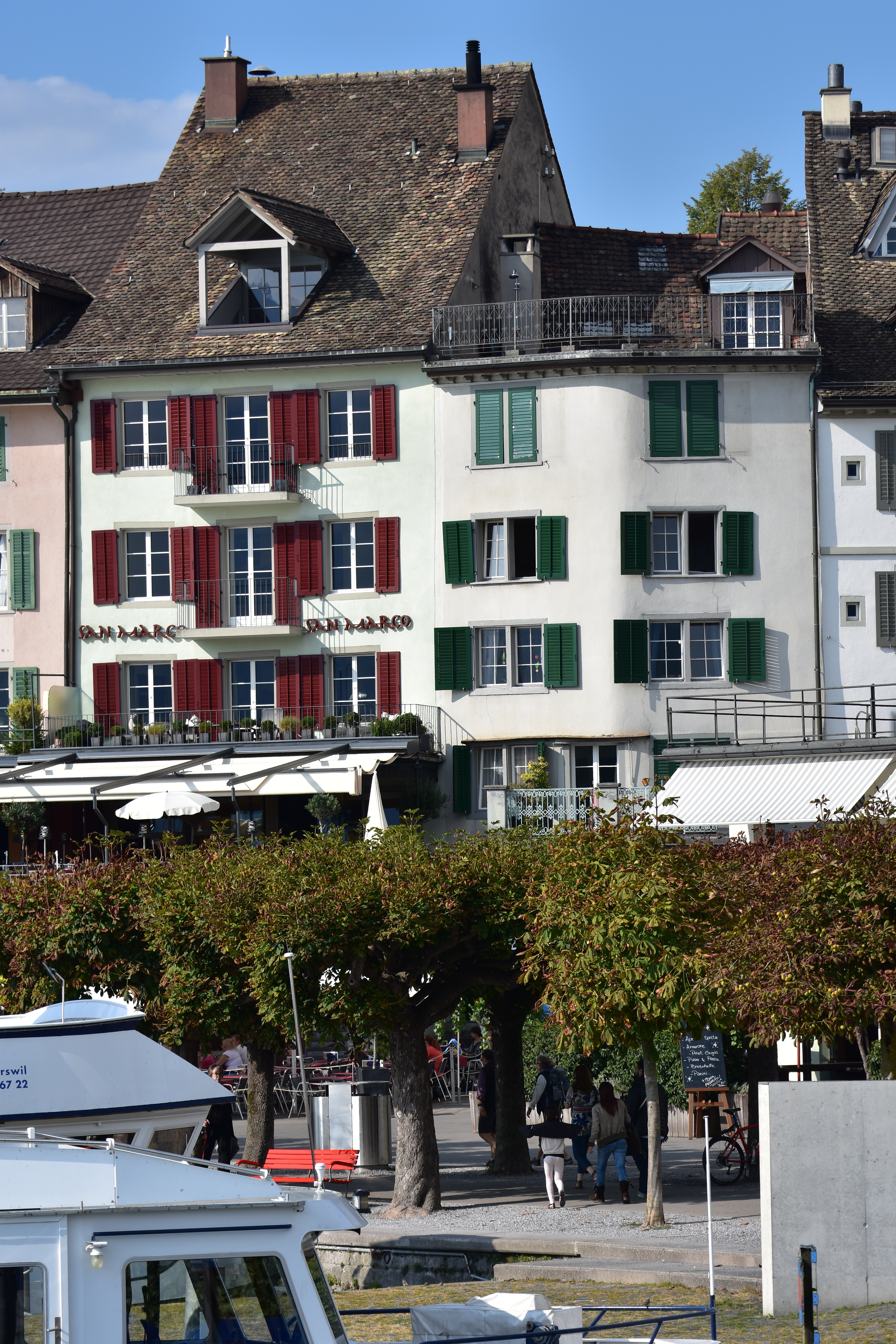 Alwina Gossauer's atelier, See-Quai Rapperswil (Switzerland)